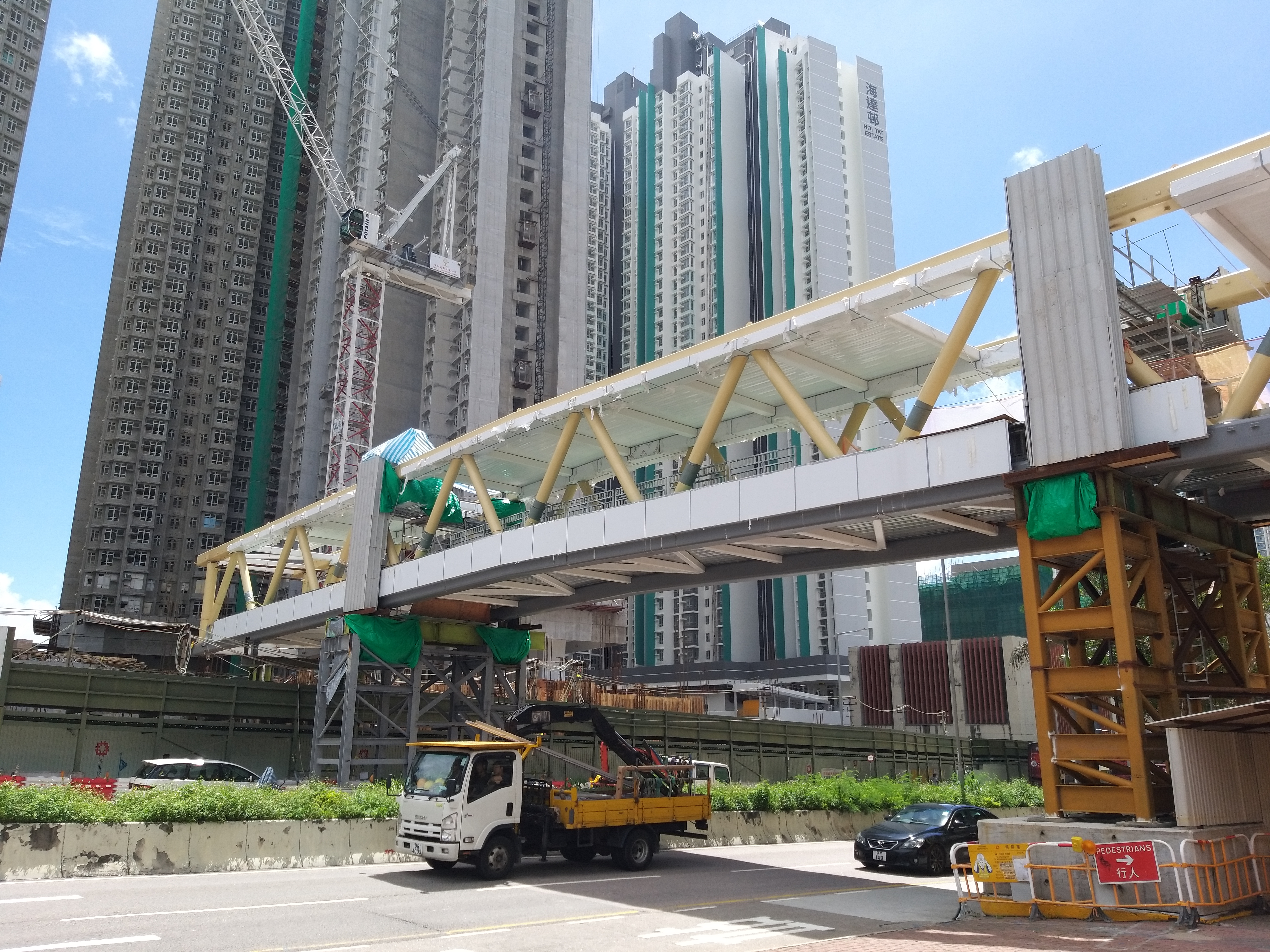 只待海達街市平頂，天橋即告合攏